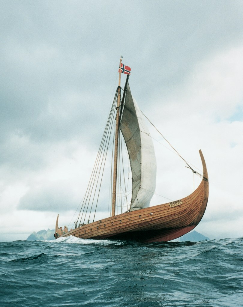 Photo : Runar Storeide